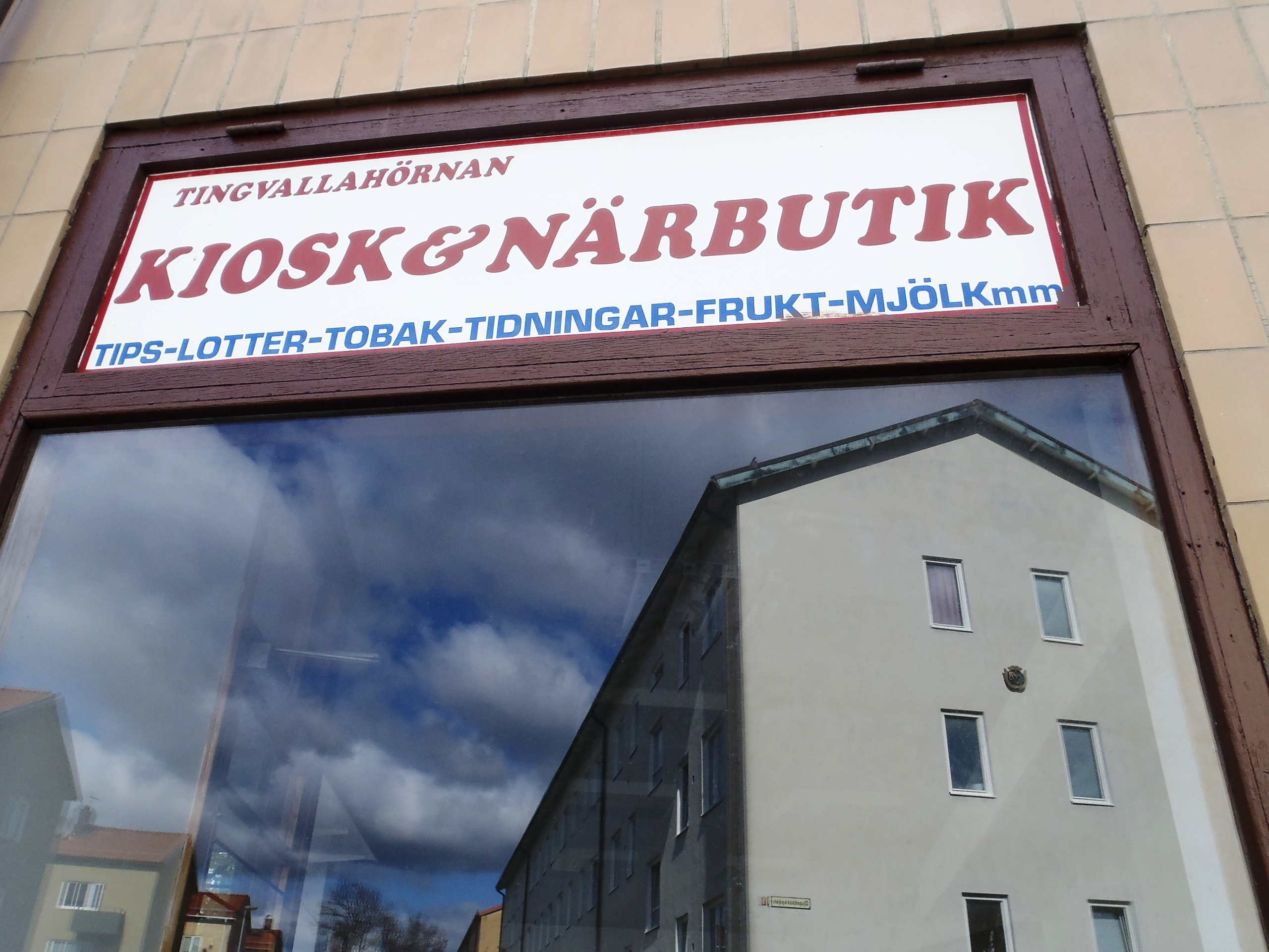 FunkisstadsdelenTingvalla i Trollhättan.